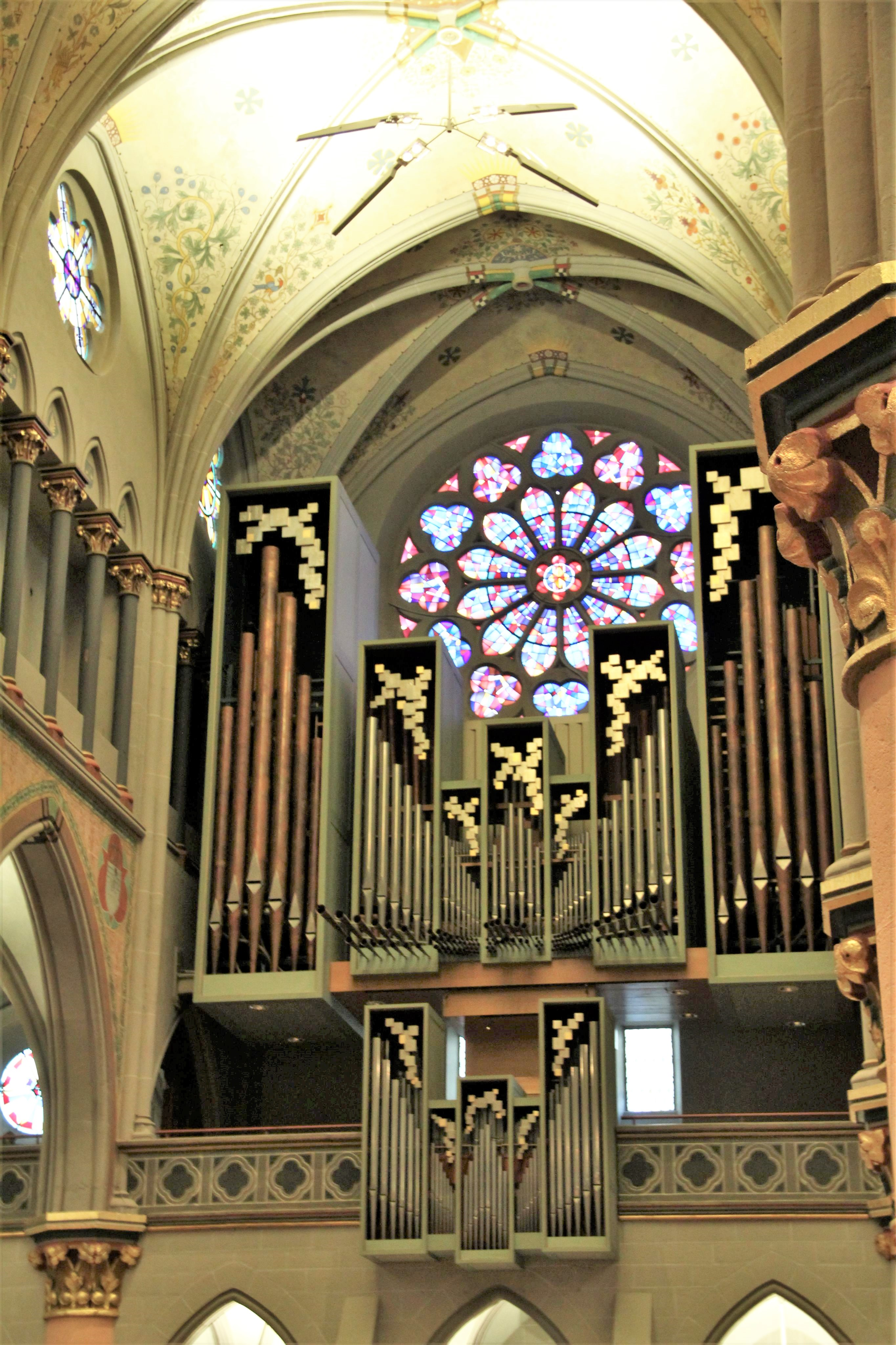 Westenfelderuergel vun 1977